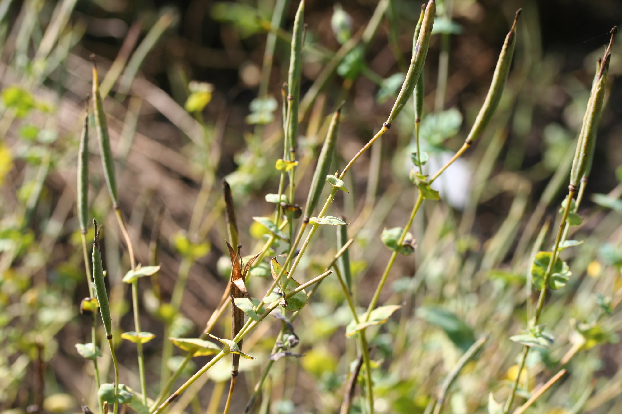 Dicranostigma erectum im Botanischen Garten Dresden